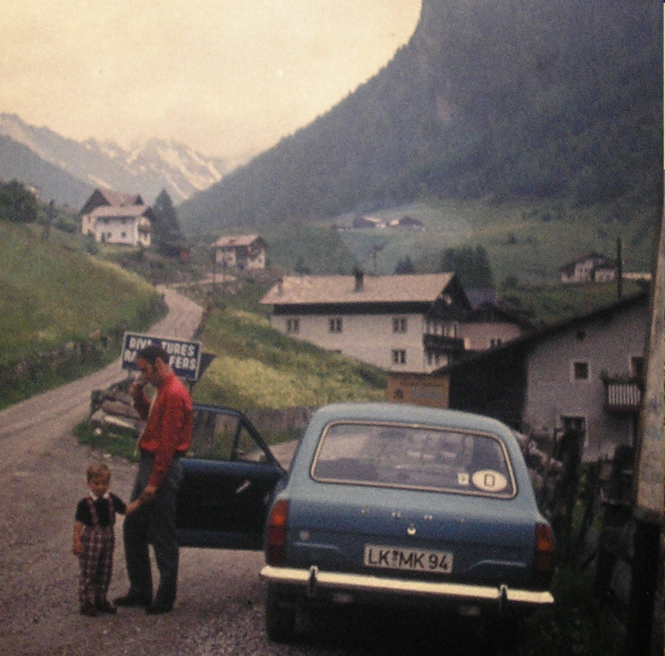 Auto mit LK Kennzeichen in Südtirol im Jahre 1972